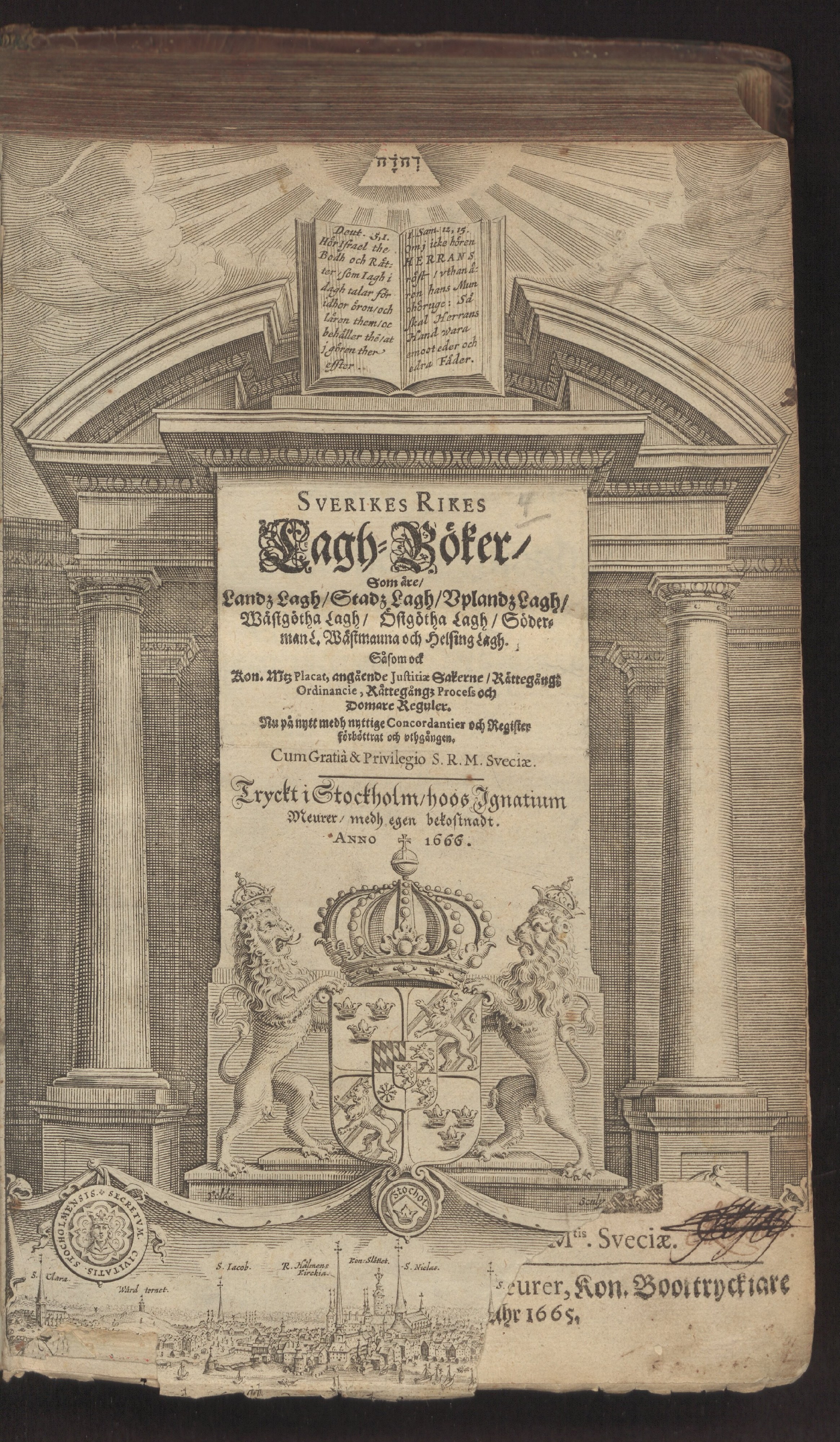 Hälsingelagen 1666 - sida 5